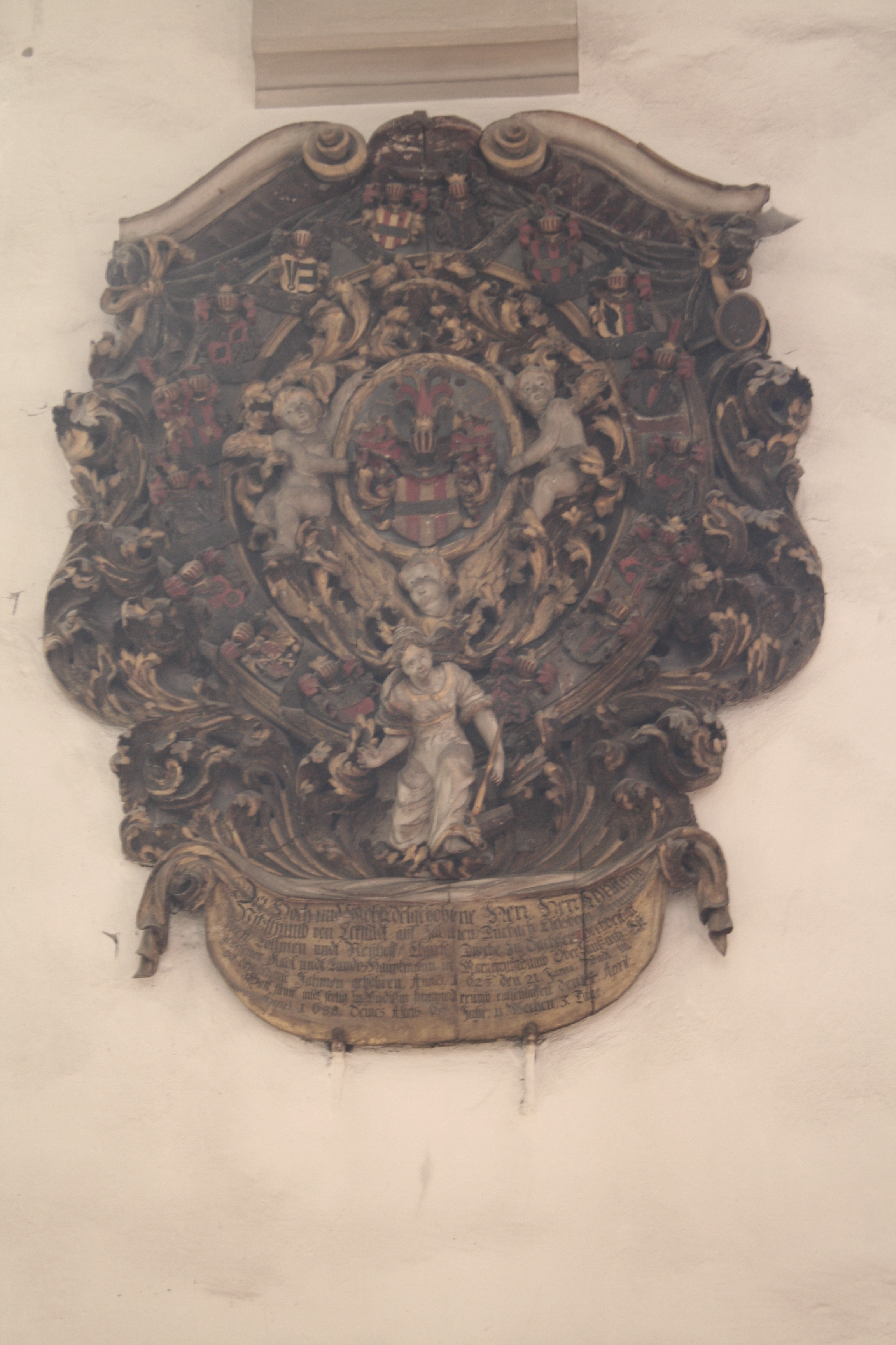 Dom St. Petri. Denkmal des Christoph Vitzthum von Eckstädt Hornjoserbsce: Tachantska cyrkej swj. Pětra w Budyšinje; pomnik Christopha Vitzthuma z Eckstädta.